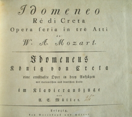 Première page du livret de l'opéra Idomeneo, re di Creta de Wolfgang Amadeus Mozart. Libretiste : Giambattista Varesco